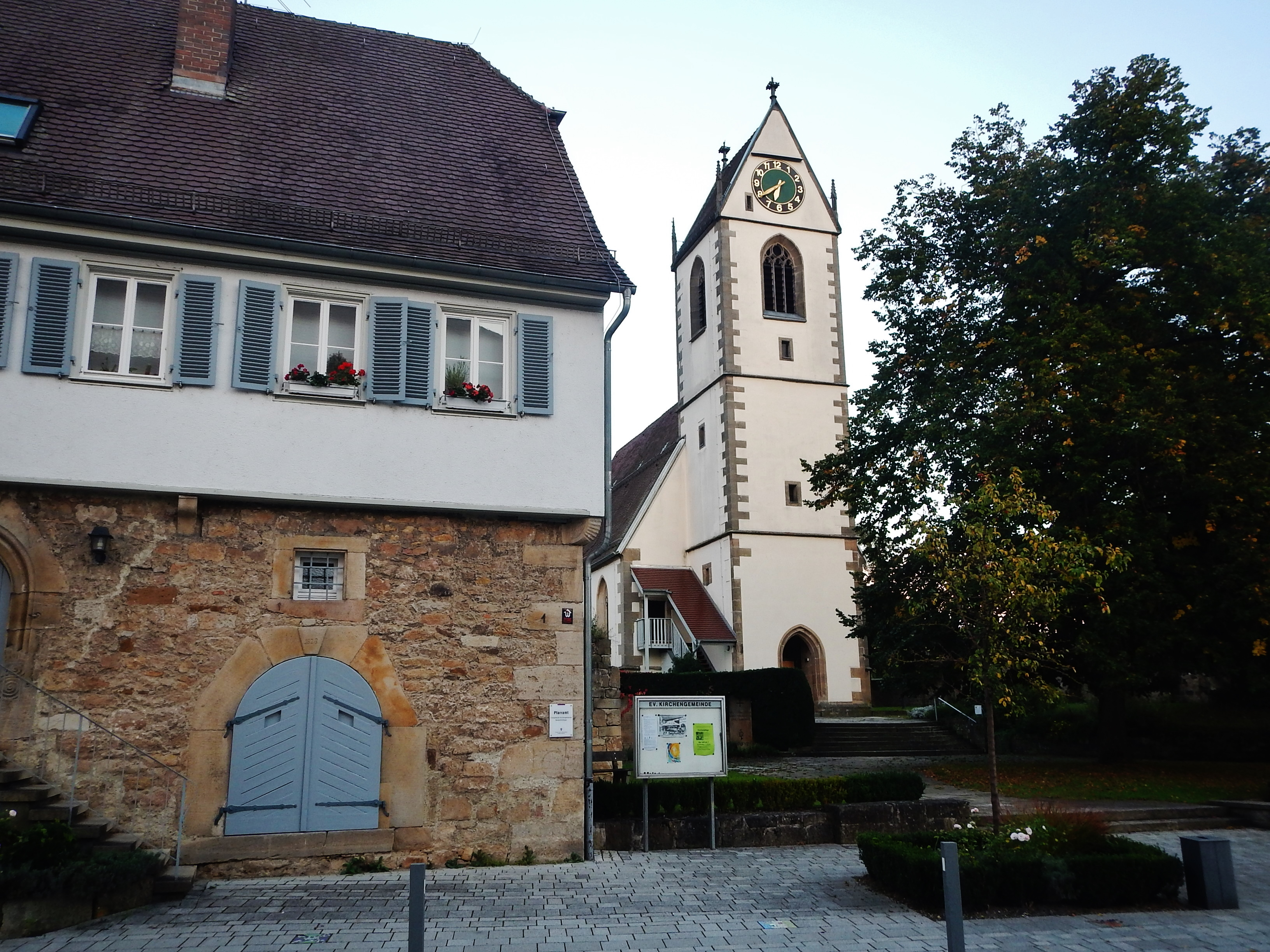 Beim 366 km langen Neckartalradweg: Neckartenzlingen mit evangelischer Martinskirche